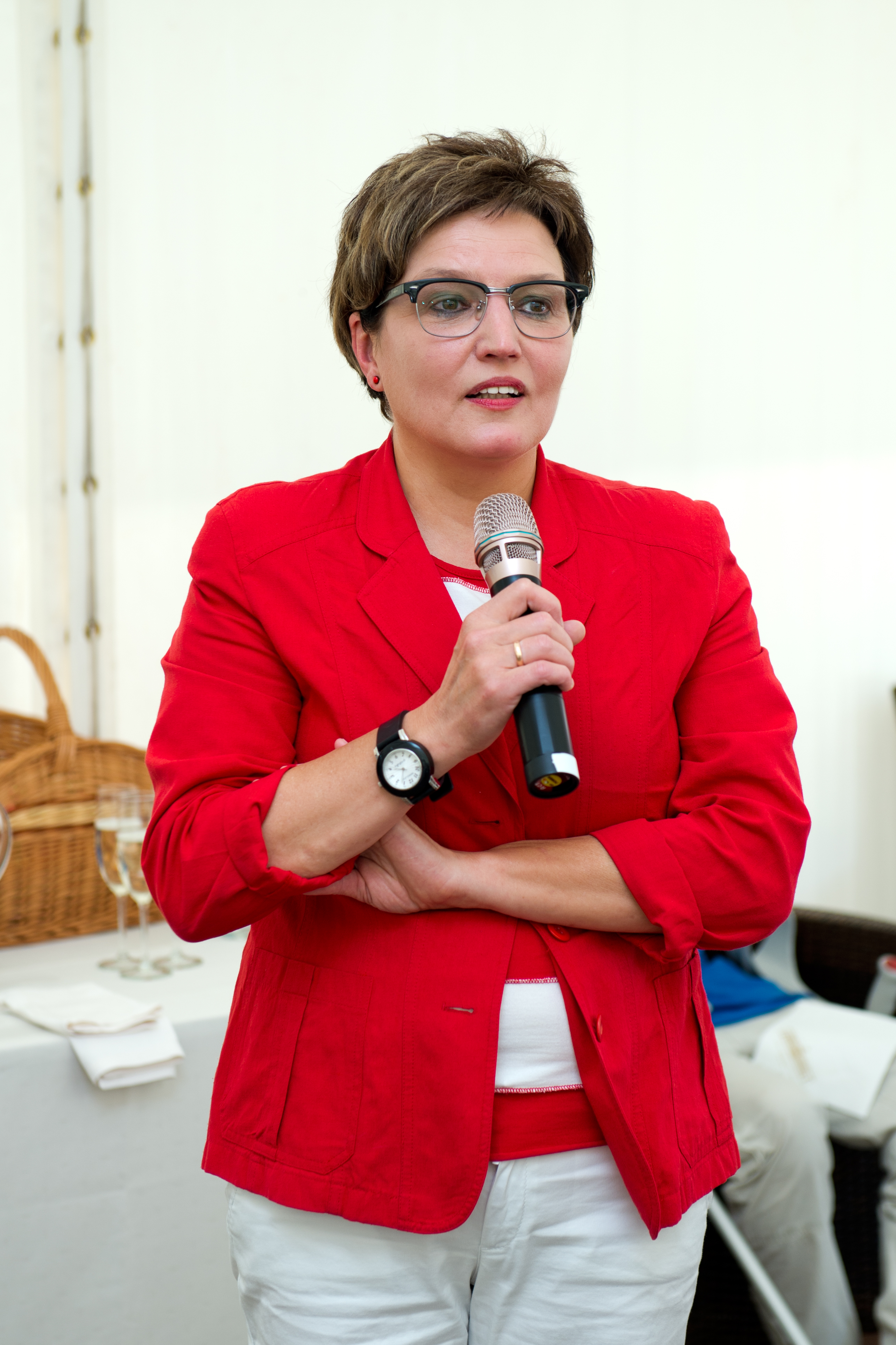 Avatud Eesti Fondi juhataja Mall Hellam